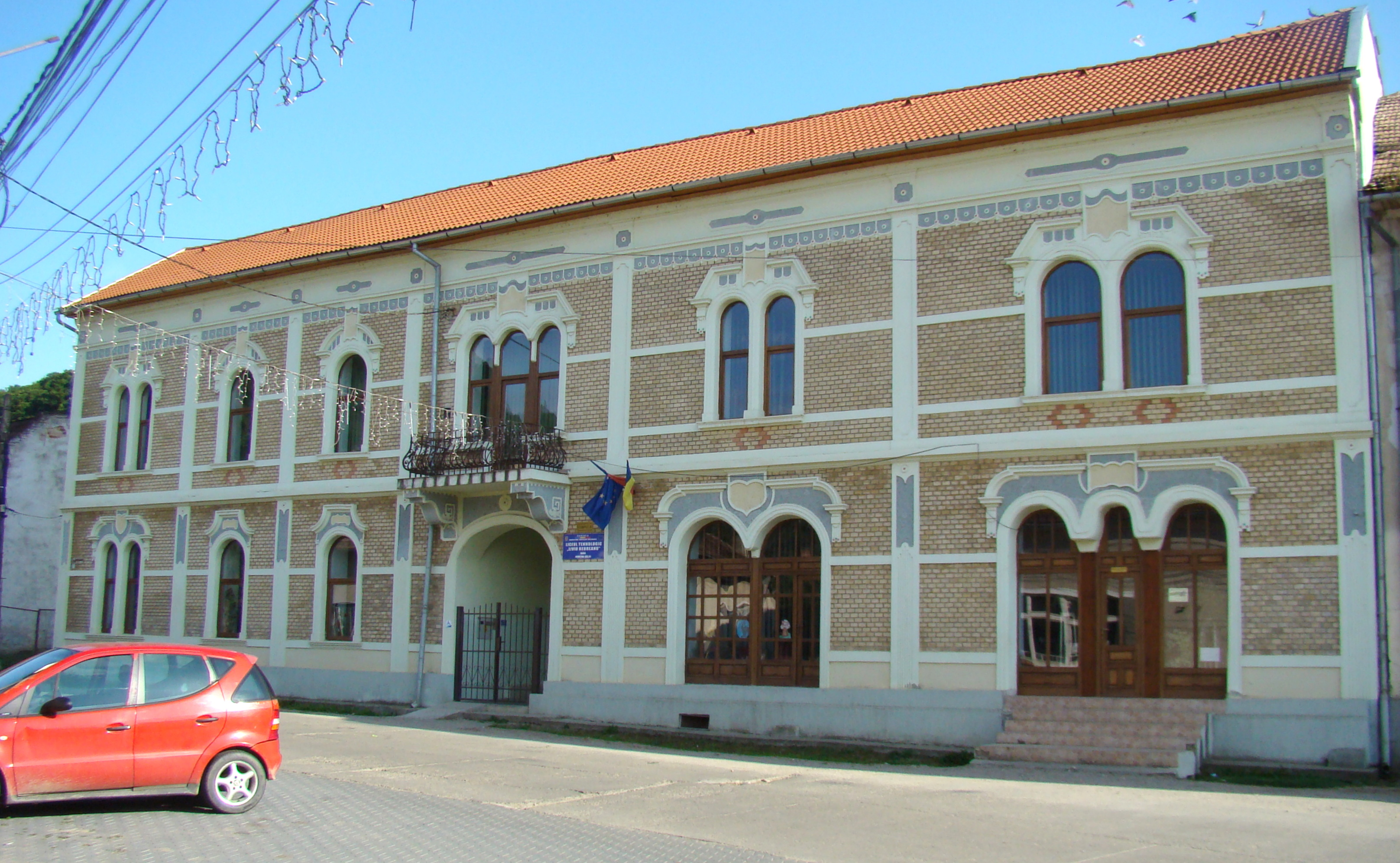 Fosta judecătorie (în prezent Liceul tehnologic „Liviu Rebreanu”, corpul B), sat Hida; comuna Hida, județul Sălaj